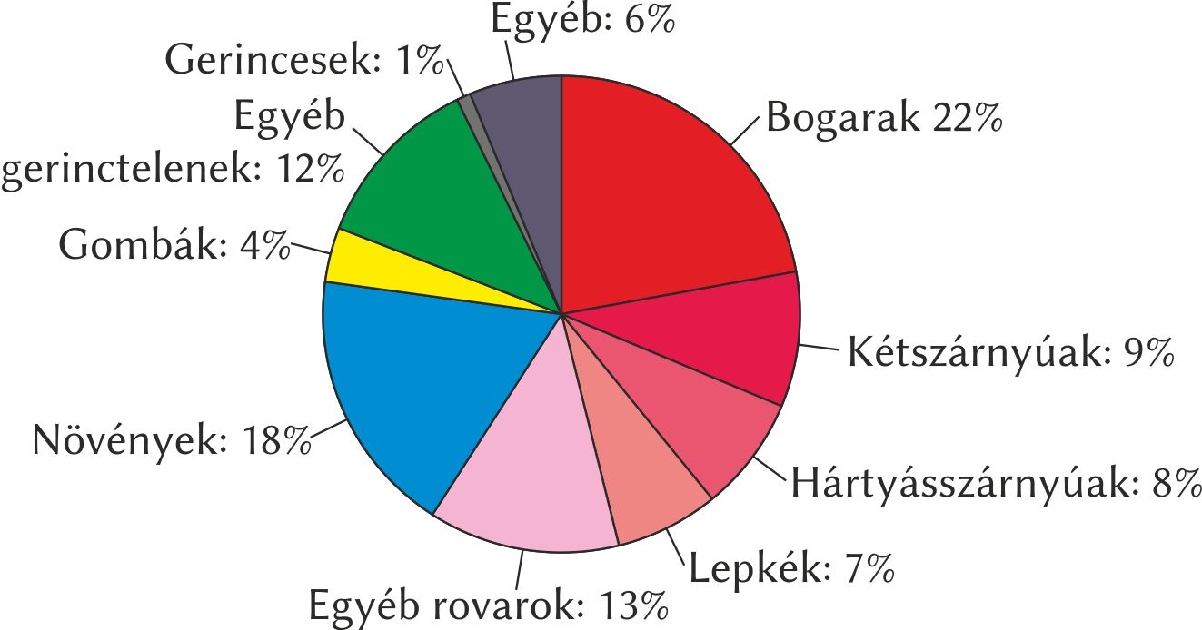 Ismert fajoik megoszlása